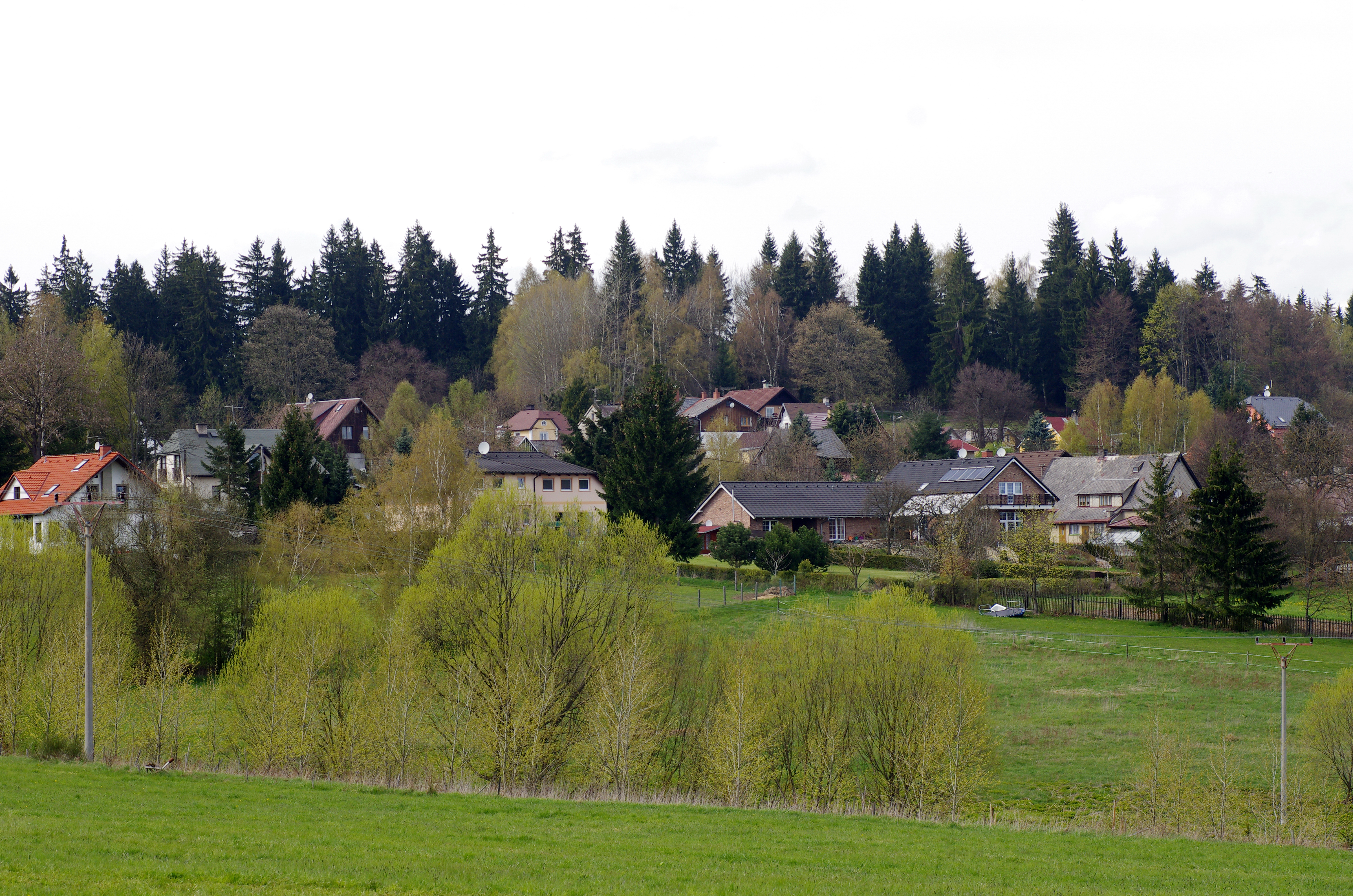 Krásné, část obce Tři Sekery, okres Cheb